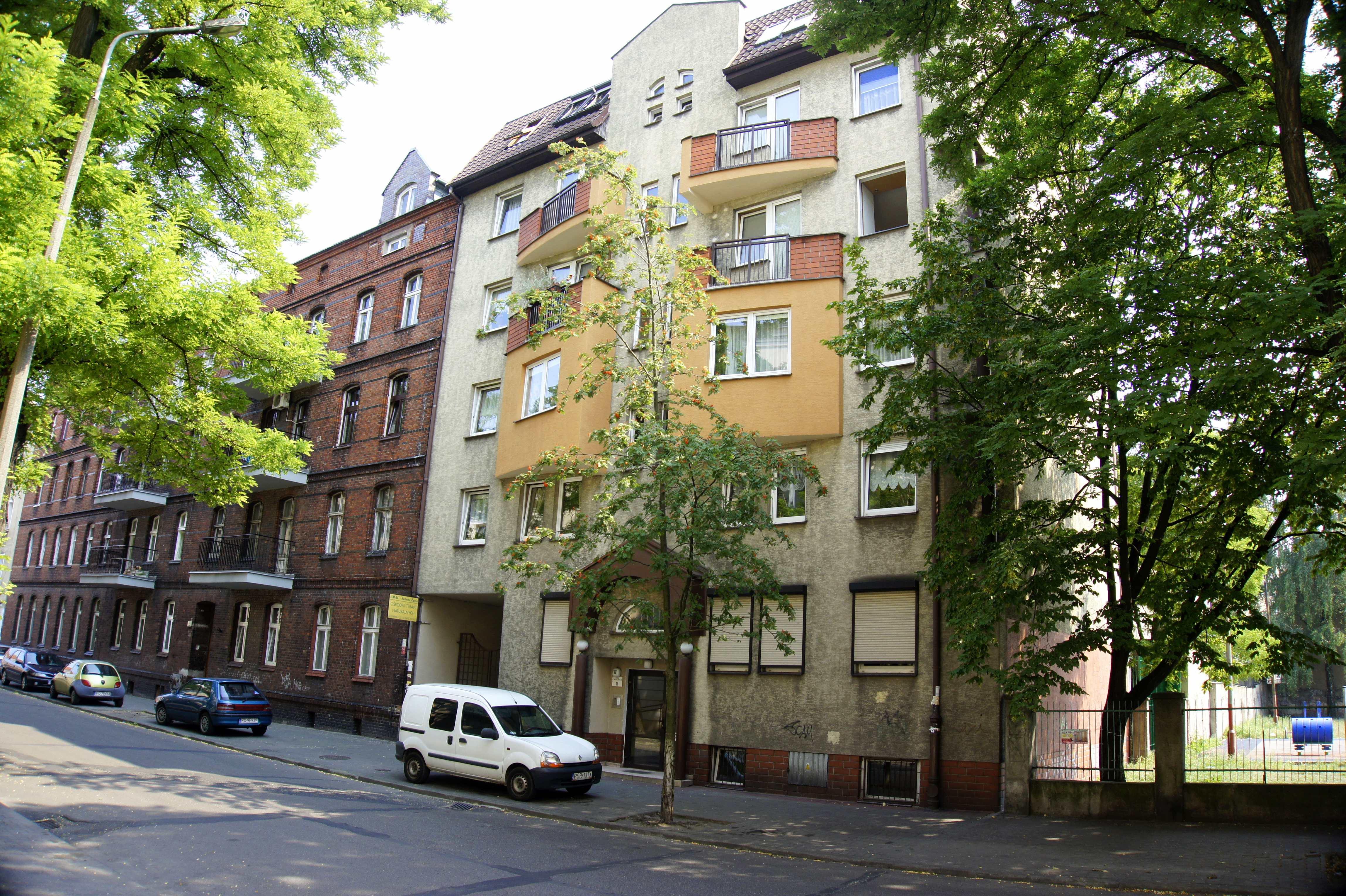 Poznań, dzielnica Łazarz. Południowa pierzeja ulicy z postmodernistycznym budynkiem mieszkalnym nr 5, którego inwestorem była S.M. " Wielkopolanka ". Powstał z początkiem lat 90 XX w. Obok lokali mieszkalnych, znajduje się w nim Dom Zakonny Sióstr Franciszkanek Od Pokuty i Miłości Chrześcijańskiej - Wspólnota Maryi Matki Kościoła ( lokal nr 10 )